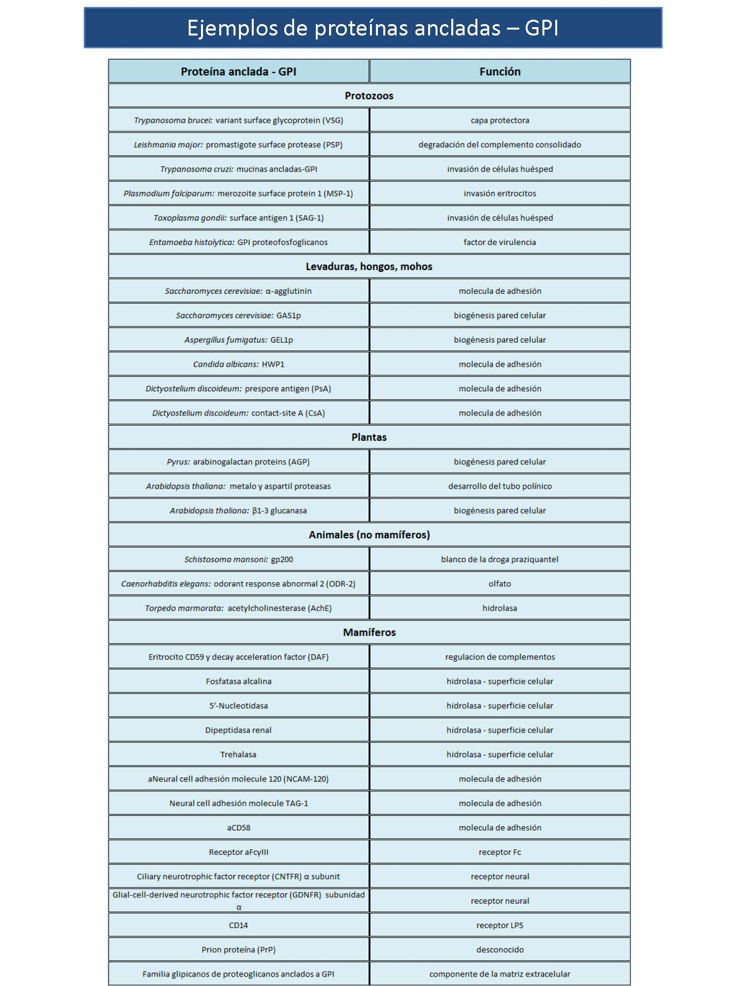 Tabla 2 estructura wiki